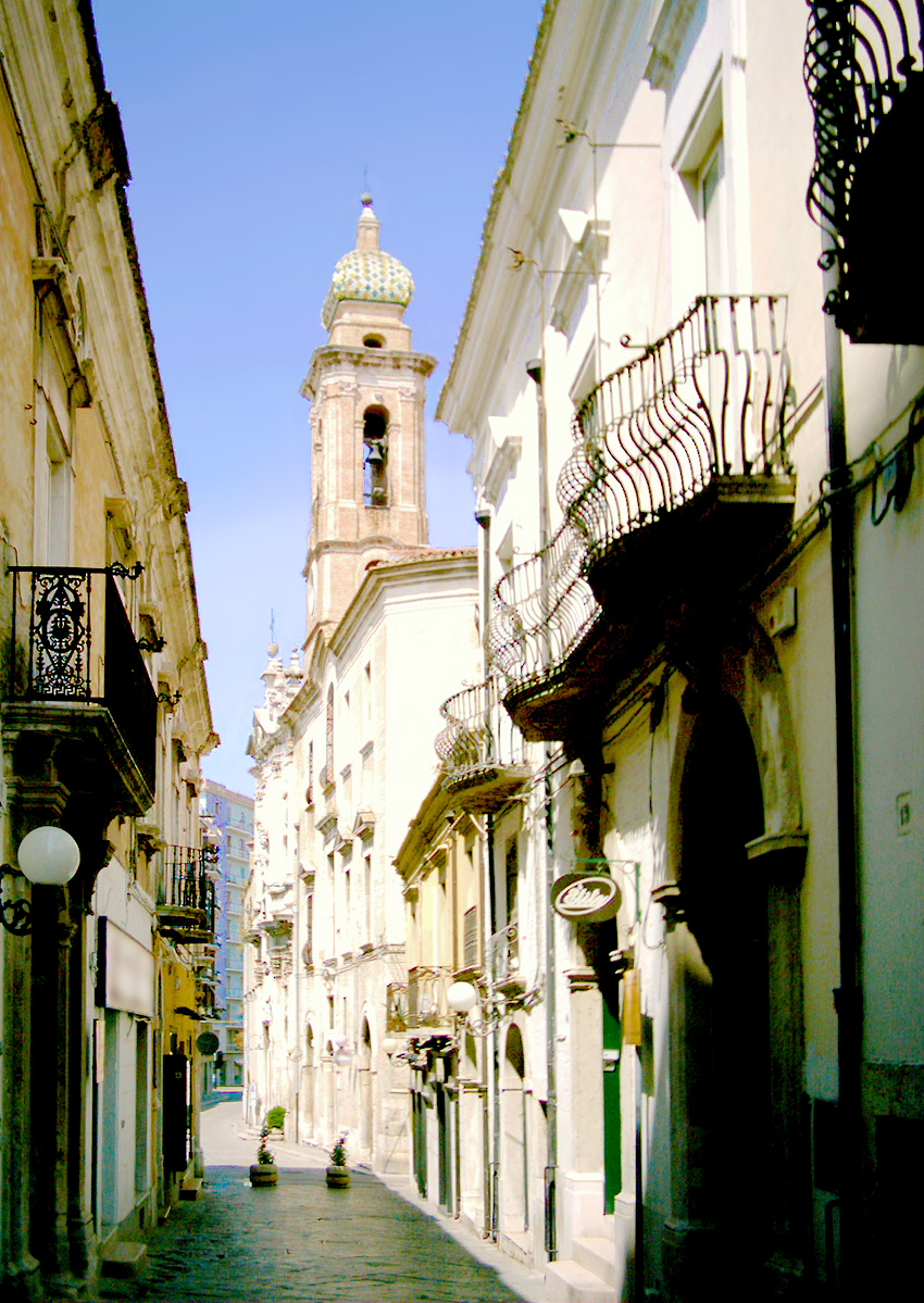 San Severo, corso Vittorio Emanuele II, l'antica "Scesa delle Monache".